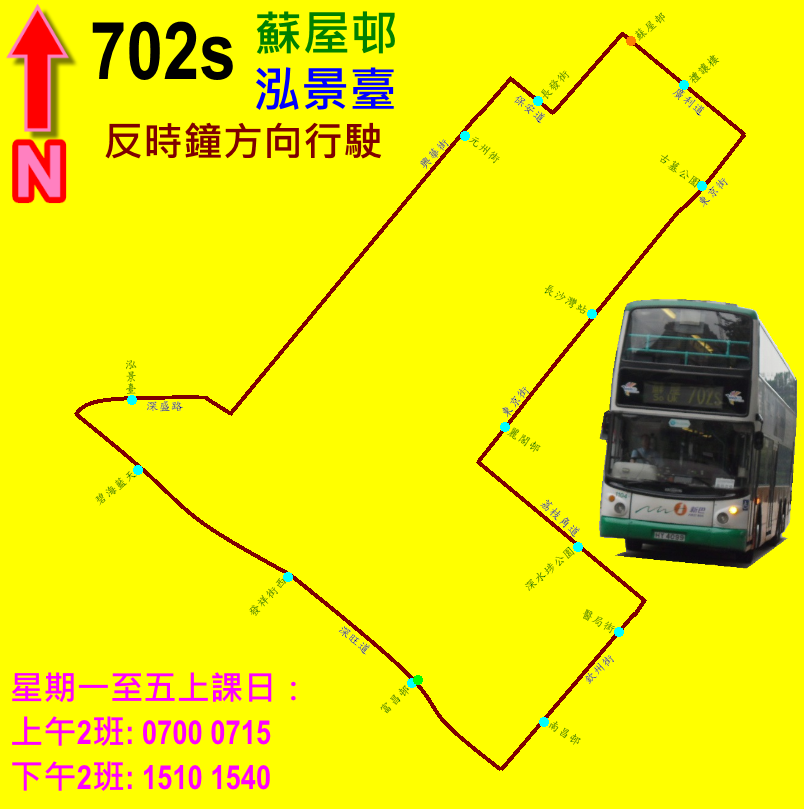 中文（香港）: 新巴702S線的走線圖